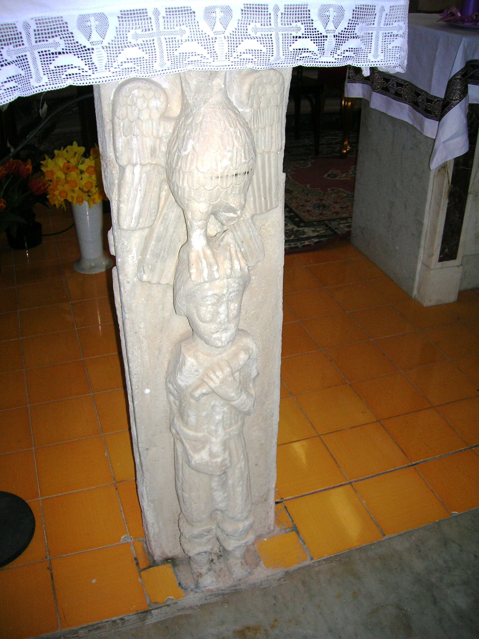 Chiesa di Santa Maria dell'Assunta a Gragnano